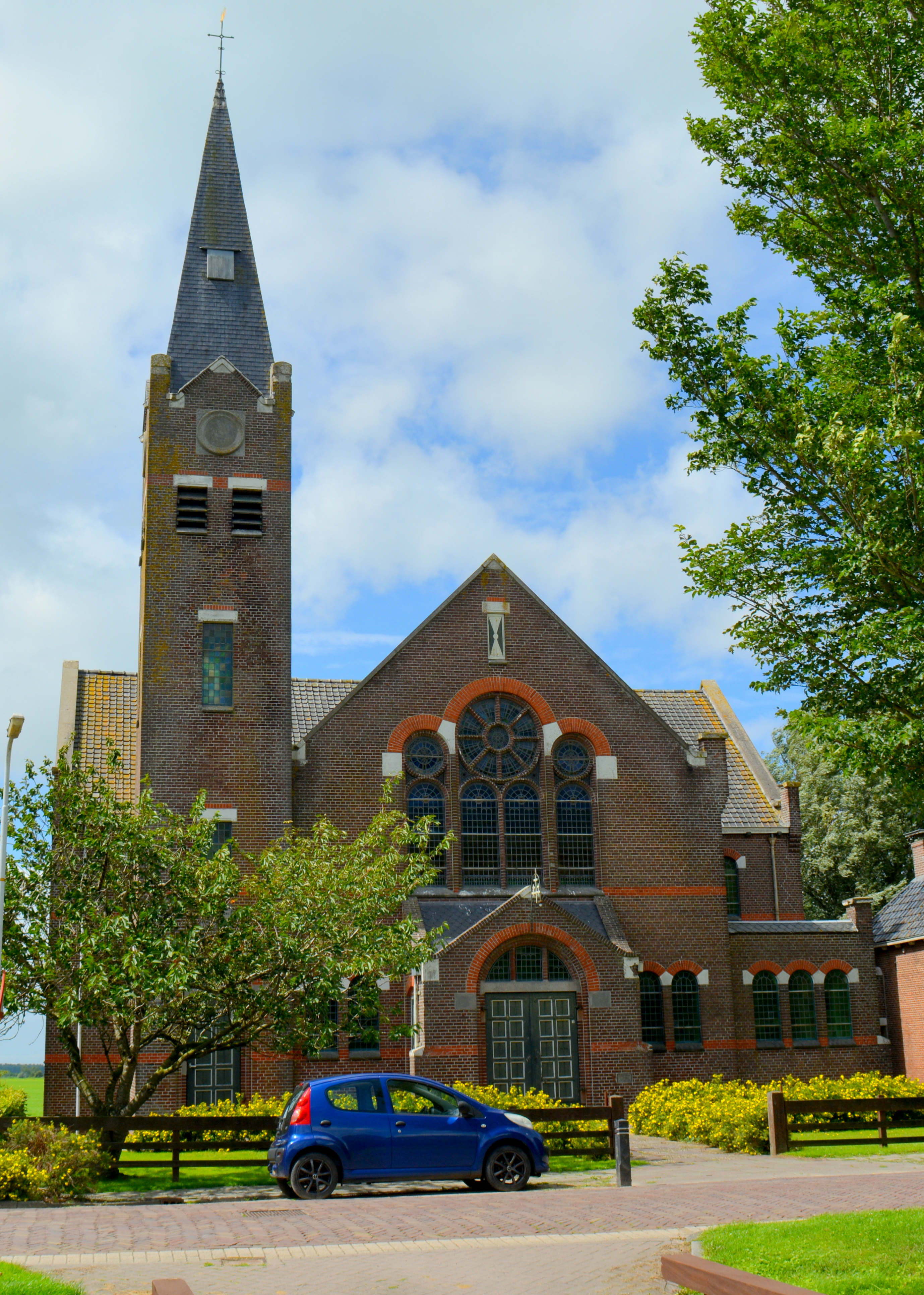 Lollum, gereformeerde kerk